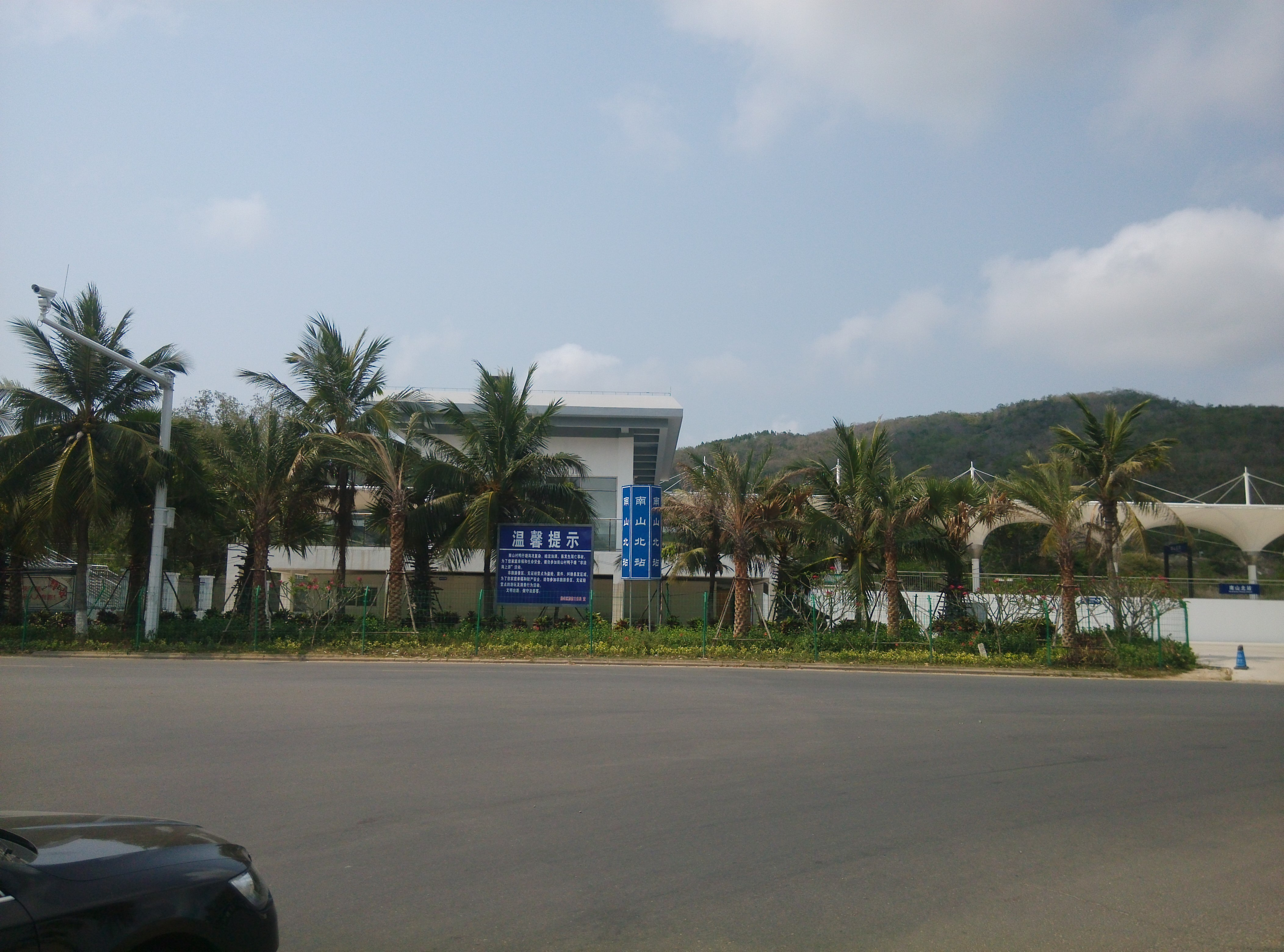 南山北駅舎。